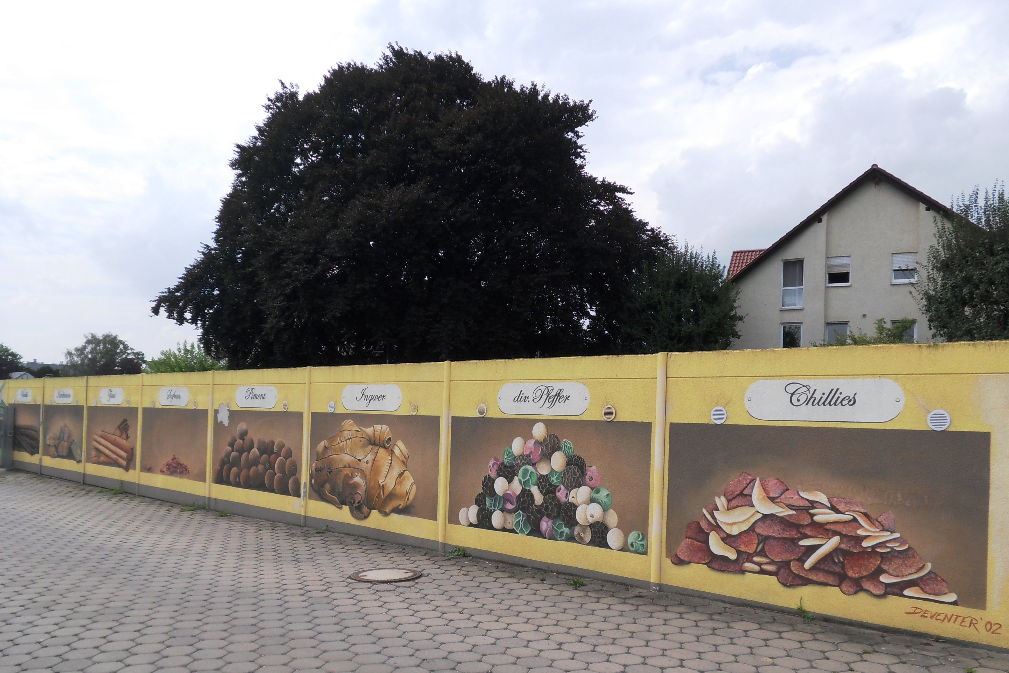 Van-Hees-Straße, Privatstraße des Gewürzmühlenbetriebes in Niederwalluf entlang der Eisenbahnlinie mit Graffiti der hier verarbeiteten Rohstoffe